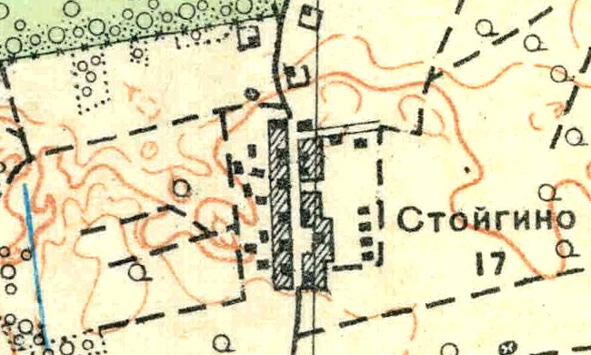 Топографическая карта Ленинградской области, квадрат О-35-23-А-г (Черенковицы), деревня Стойгино